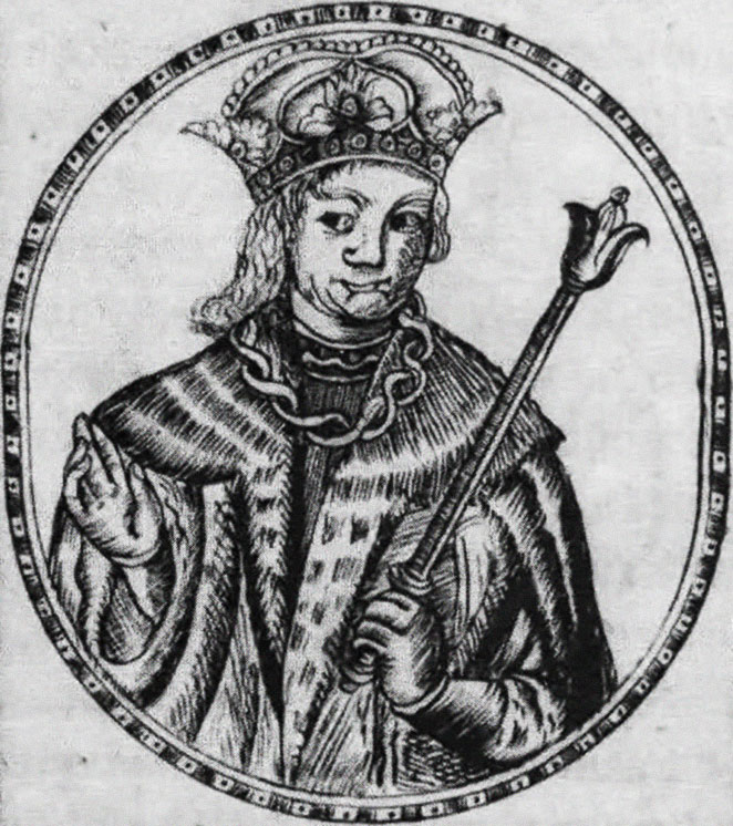 Беларуская (тарашкевіца): Уяўны партрэт караля Міндоўга